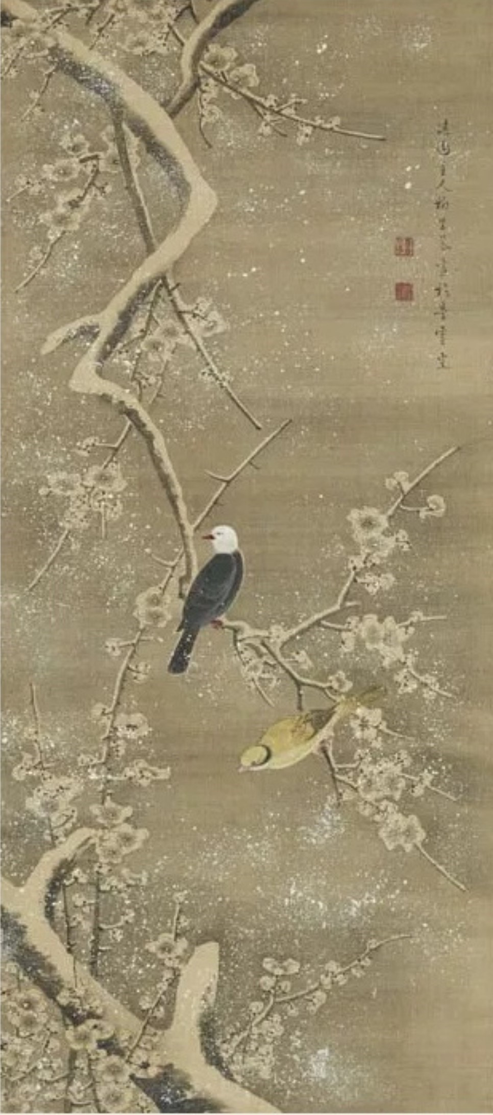 Painting birds at wintertime